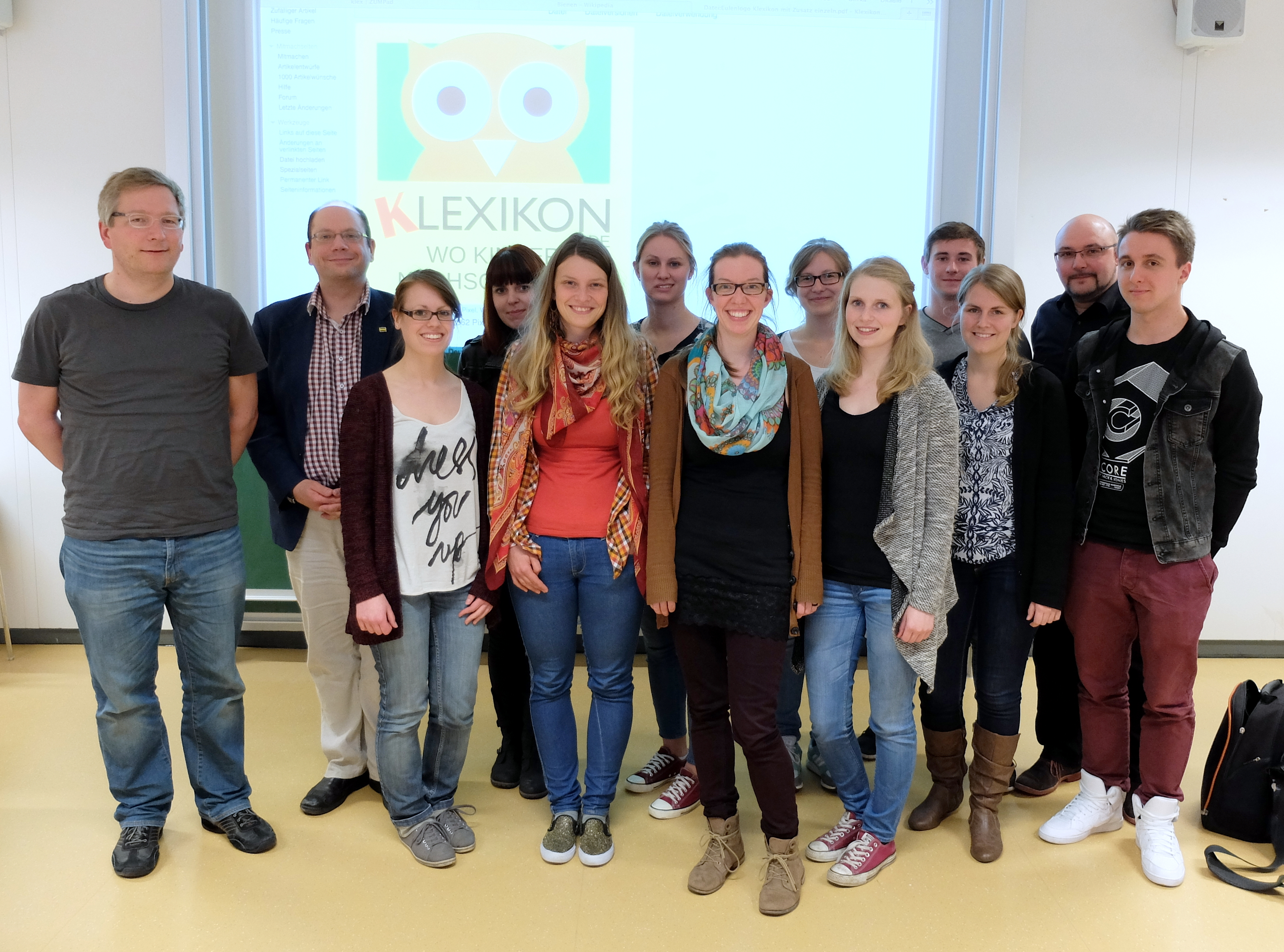 Ein Klexikon-Tag an der Technischen Universität Dortmund, mit Vortrag und Workshop. Siehe hier